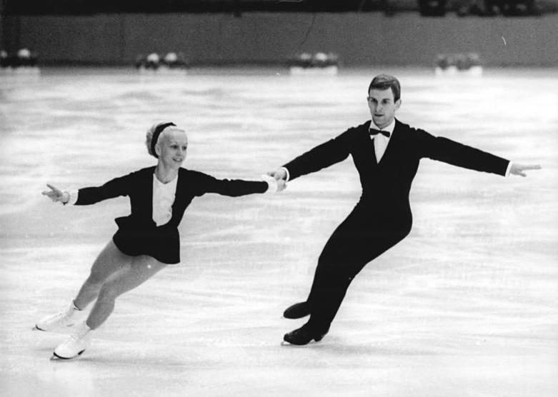 Heidemarie Steiner, Heinz-Ulrich Walther Zentralbild Wendorf Sche 20.2.1969 Vorbereitung Weltmeisterschaften im Eiskunstlaufen und Eistanzen vom 25.2.-2.3.1969 in Colorado Springs (USA). Die Deutschen Meister der DDR Heidemarie Steiner und Heinz-Ulrich Walther (SC Dynamo Berlin) wollen in die Konkurrenz der Sportpaare um die vorderen Plätze eingreifen.